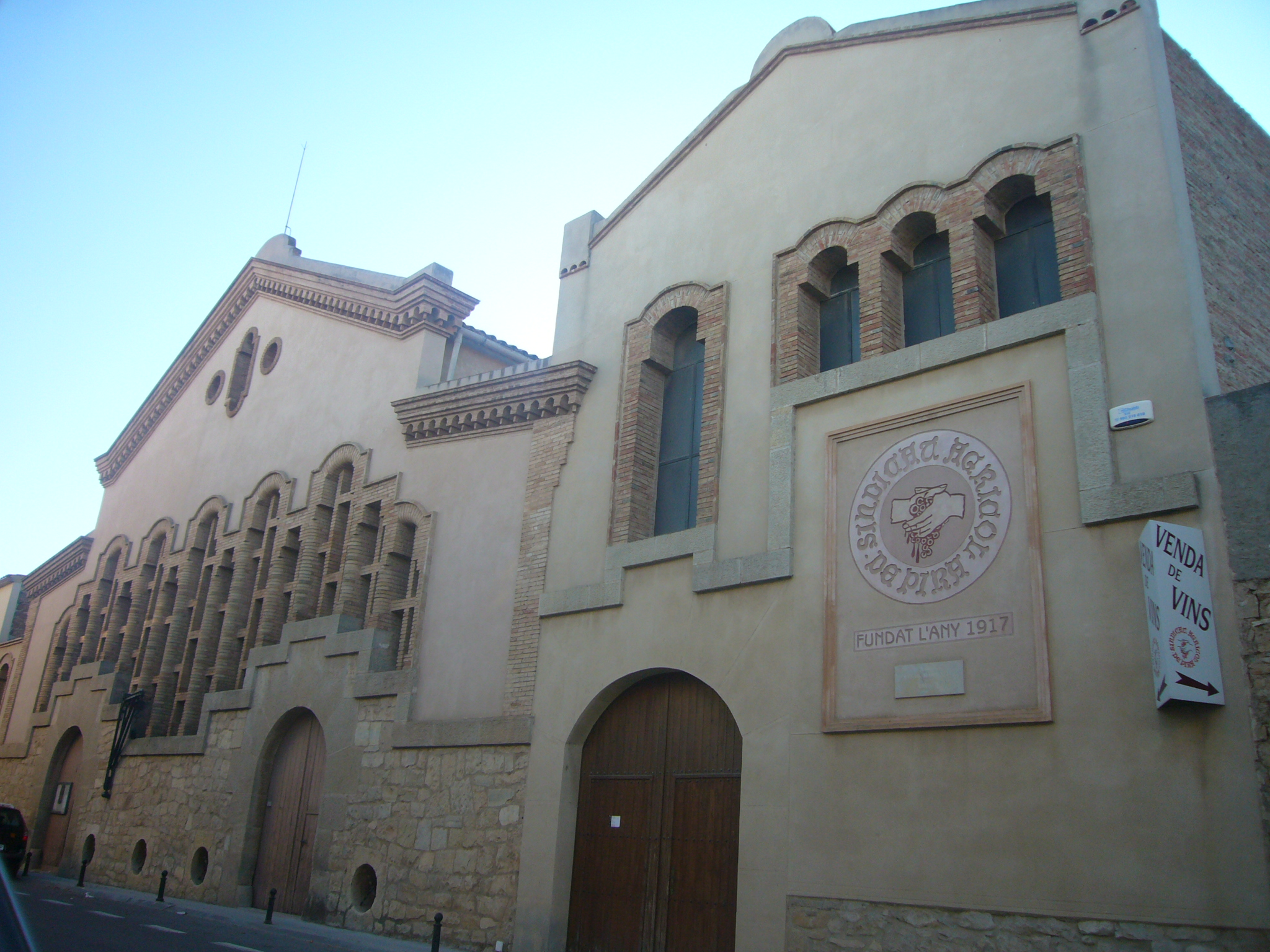 Celler del Sindicat Agrícola de Pira